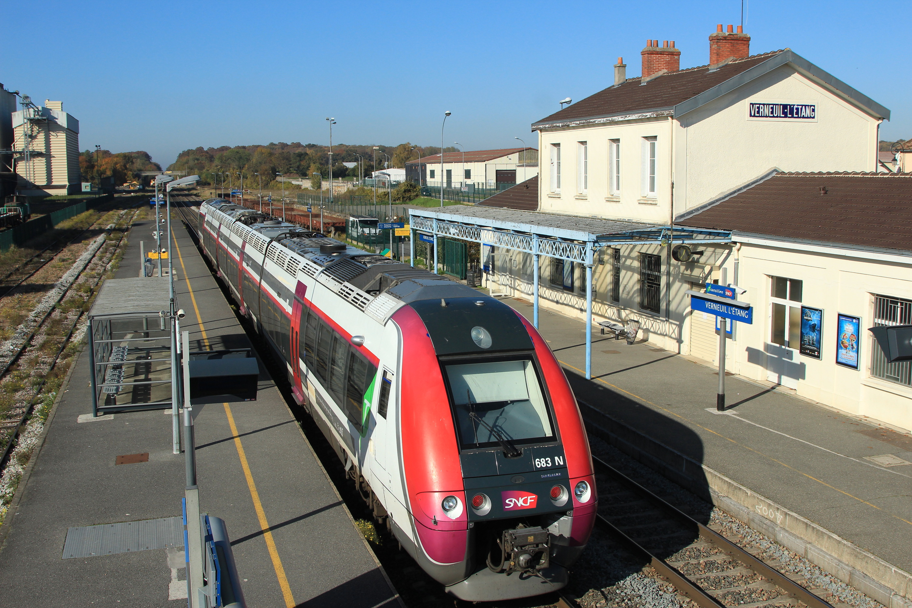 Un train Transilien de la ligne P circulant entre Provins et Paris-Est redémarre de la gare de Verneuil-l'Étang.